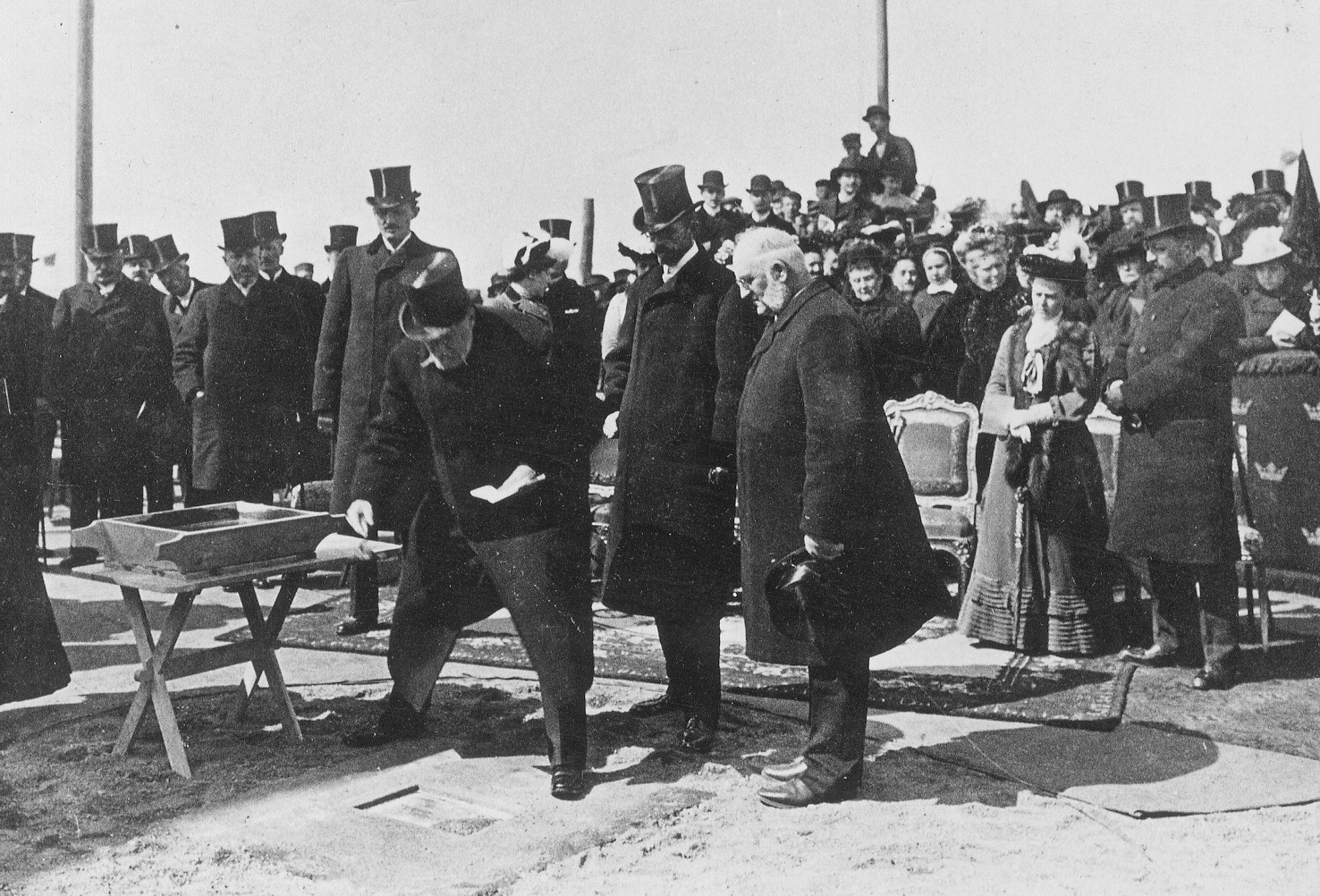 Sofia kyrka, grundstenläggning genom Oscar II, 1903-05-15